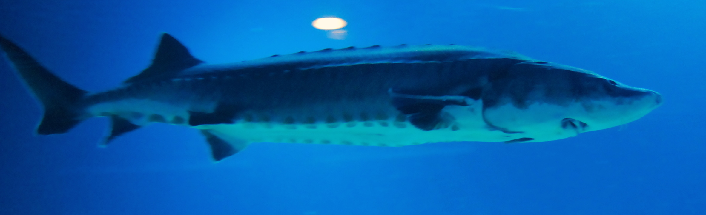 北京海洋馆的中华鲟